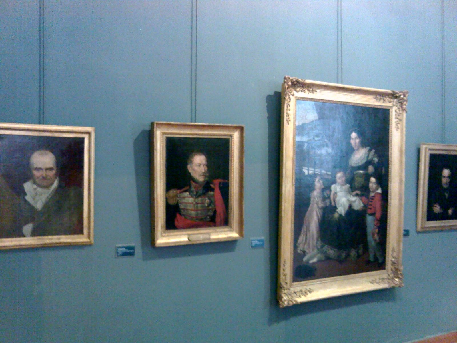 Accademia di Belle Arti di Napoli - La galleria dell'accademia, un dipinto della sala Ottocento (a sinistra l' Autoritratto di Wicar)